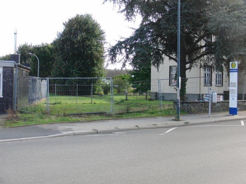 Ehemaliges Ausziehgleis des Bahnhofs Distelrath